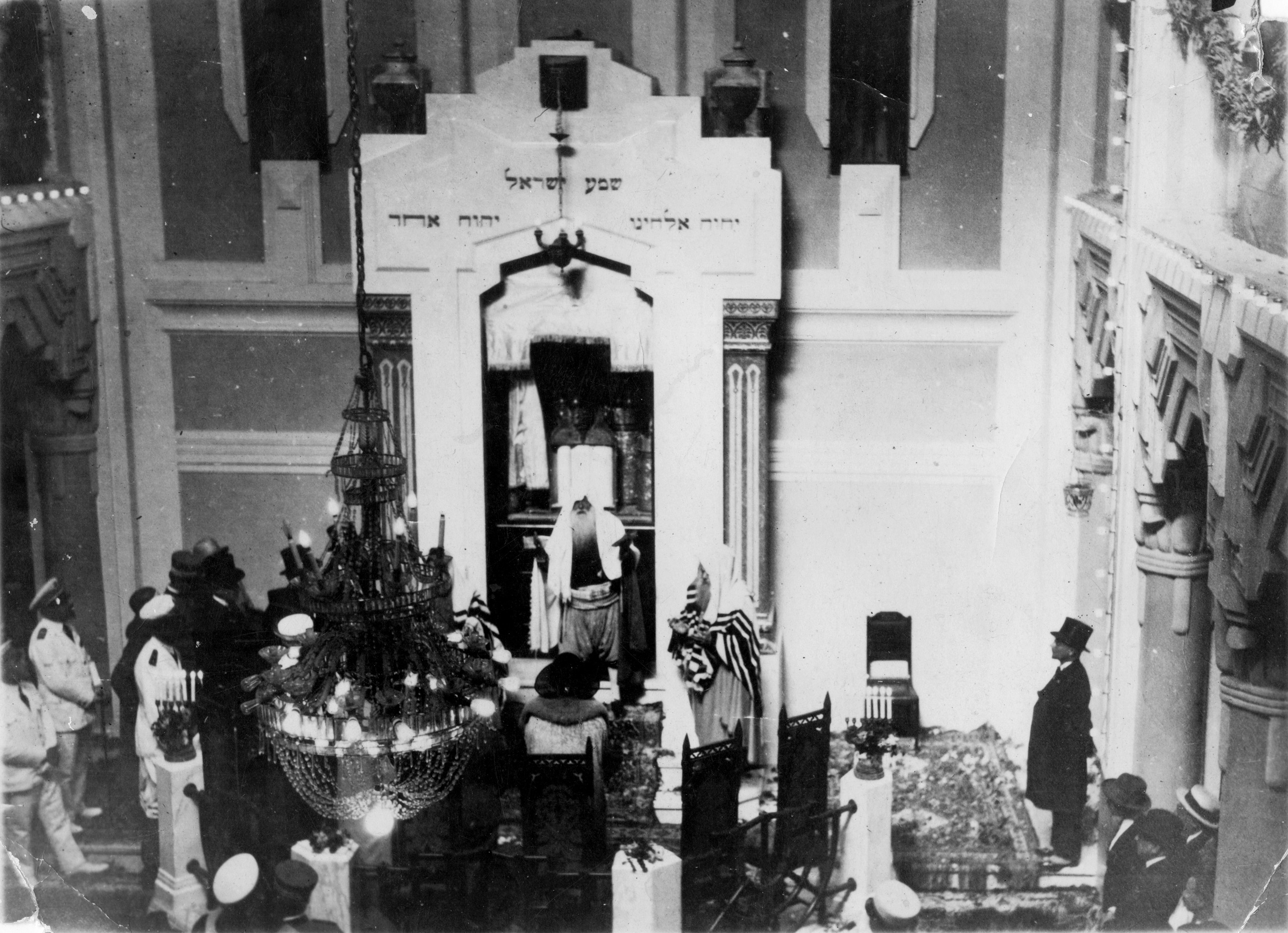 יצחק חי בוכבזה קבלת פנים של רבה הראשי לוב רבי יצחק חי בוקובזה בבית הכנסת המרכזי עבור מלך איטליה ויטוריו אמנואלה השלישי